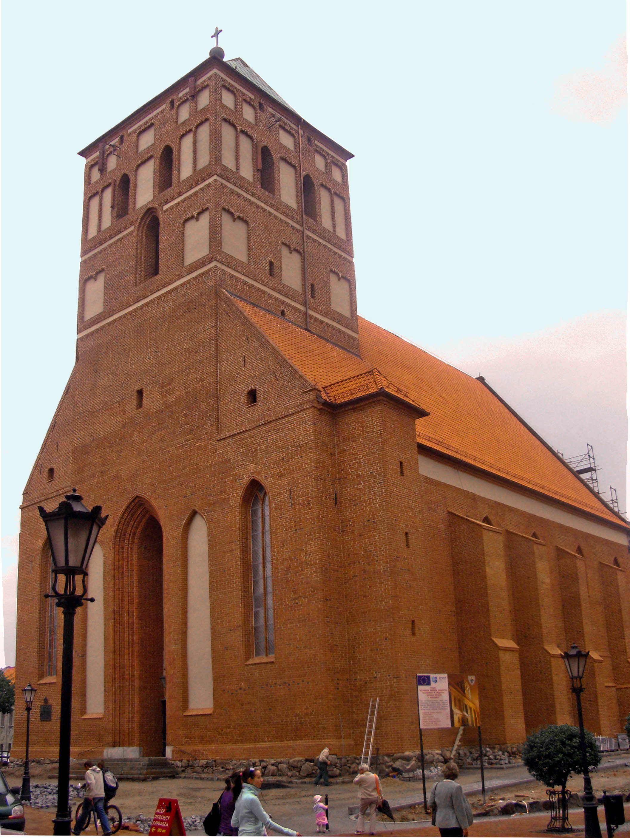 Kościół farny w Chojnicach - bazylika mniejsza p.w. Ścięcia św. Jana Chrzciciela.